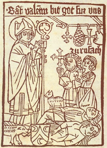 Wallfahrtsbild (Holzschnitt), um 1480, in Rufach im Elsass entstanden, in der National Gallery of Art in Washington. Valentin steht mit segnender Gebärde vor zwei Jugendlichen, die nach Abklingen ihrer Anfälle erschöpft am Boden liegen; dahinter die Eltern mit Dankesgaben; dass die Heilung dauerhaft ist, zeigen Schwein und Katze, in die die Krankheitsdämonen nach ihrer Austreibung aus dem Menschen hineinzufahren pflegen.